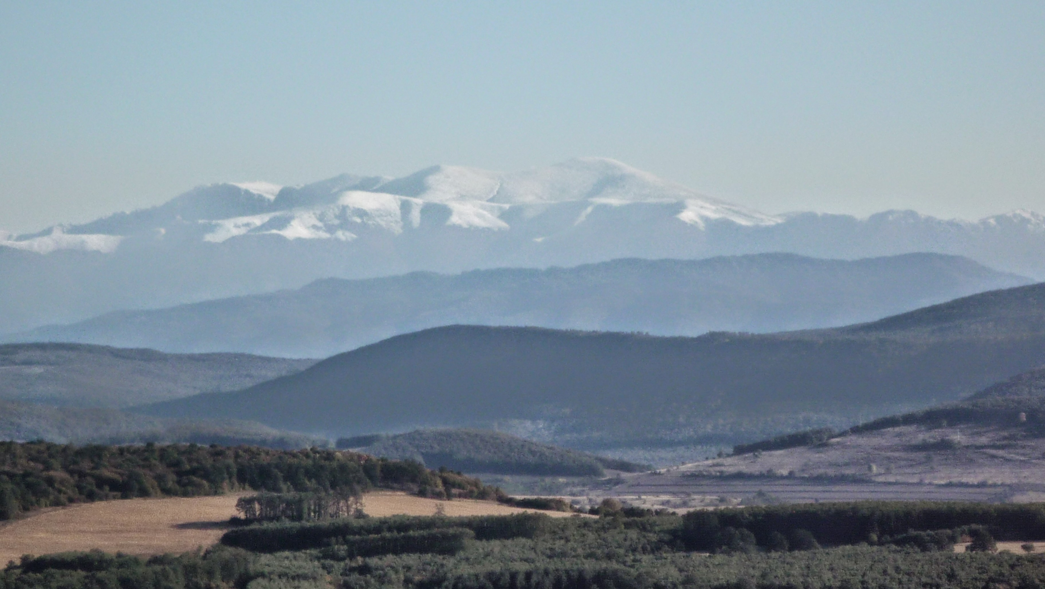 Lovech, Bulgaria